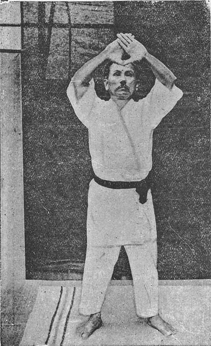 観空を演じる船越義珍(Kanku by Funakoshi Gichin, 1868 - 1957)